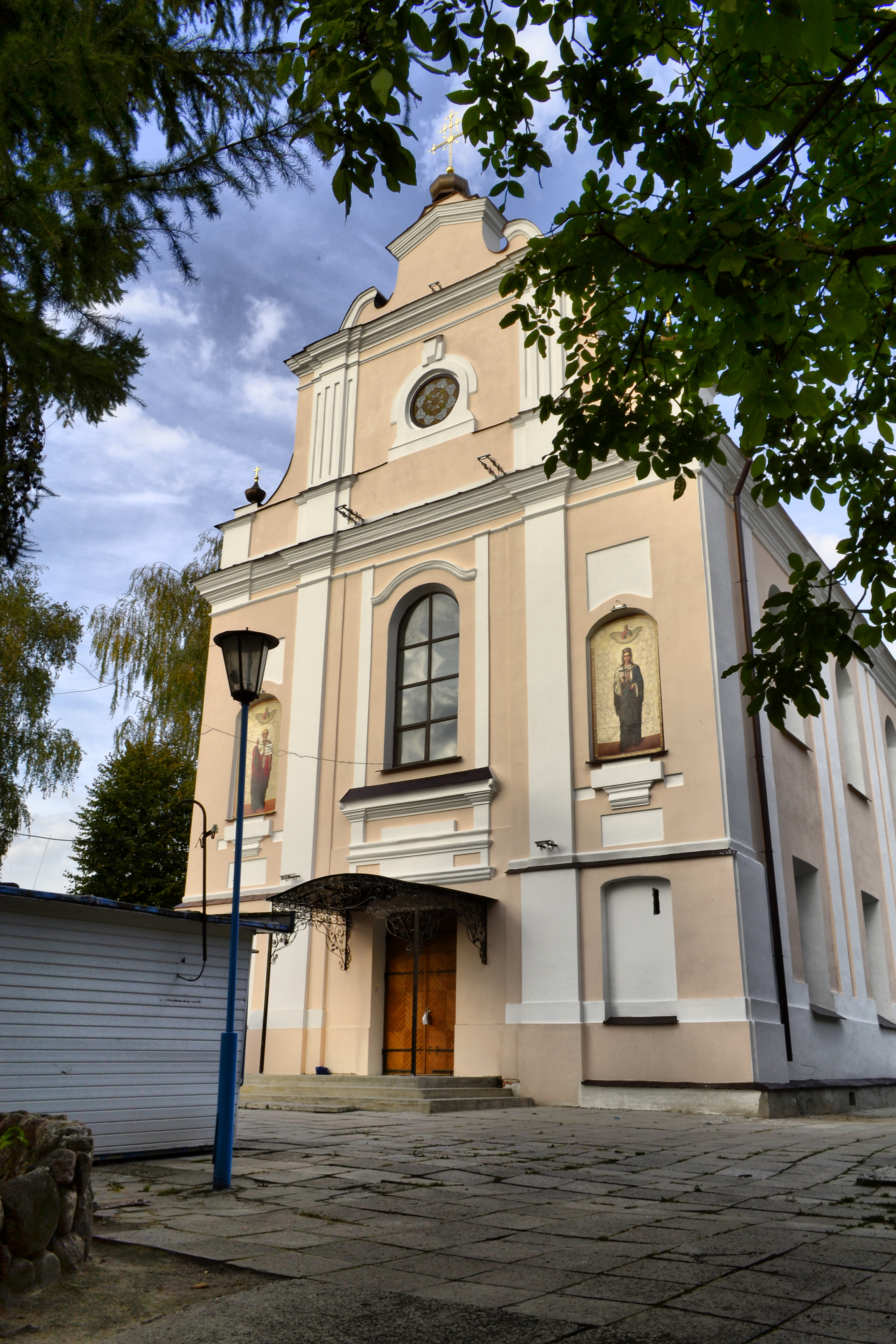 Беларуская (тарашкевіца): Ансамбль былога кляштара бэрнардынцаў:Варварынская царква, роспіс алтарнай часткі, кляштарны корпус, званіца. г. Пінск This is a photo of Belarusian heritage monument. Reference number: 112Г000544 ( WLM)